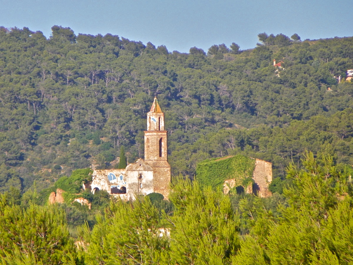 Restes de Marmellar des de la carretera d'Aiguaviva